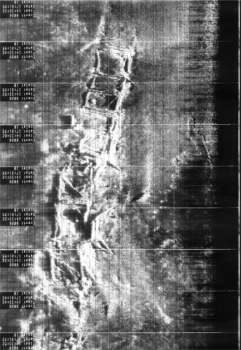 Sidescan-Sonogramm des Schlei-Seesperrwerks